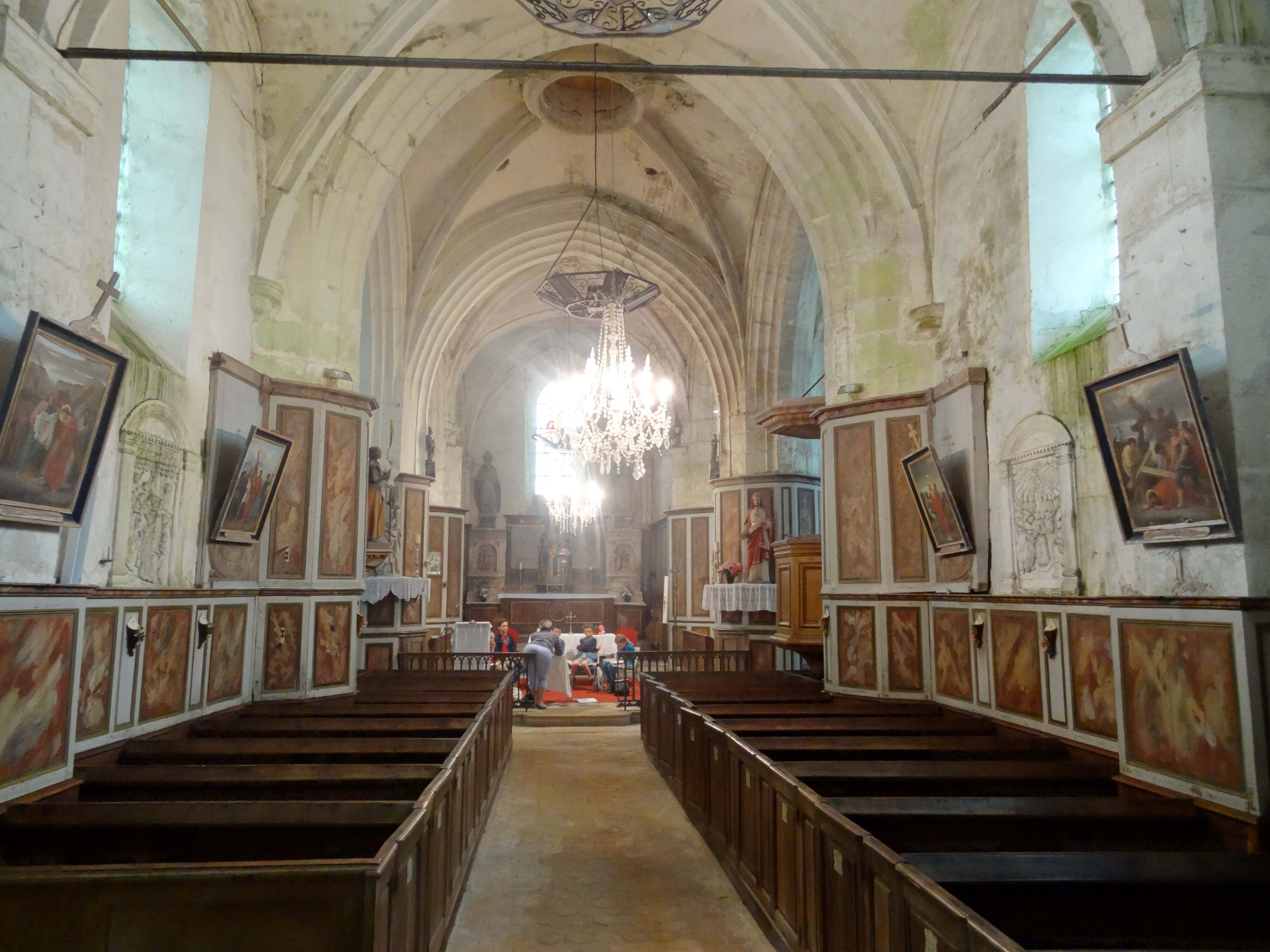 Intérieur de l'église - bancs inscrits en tant qu'objets M.H..